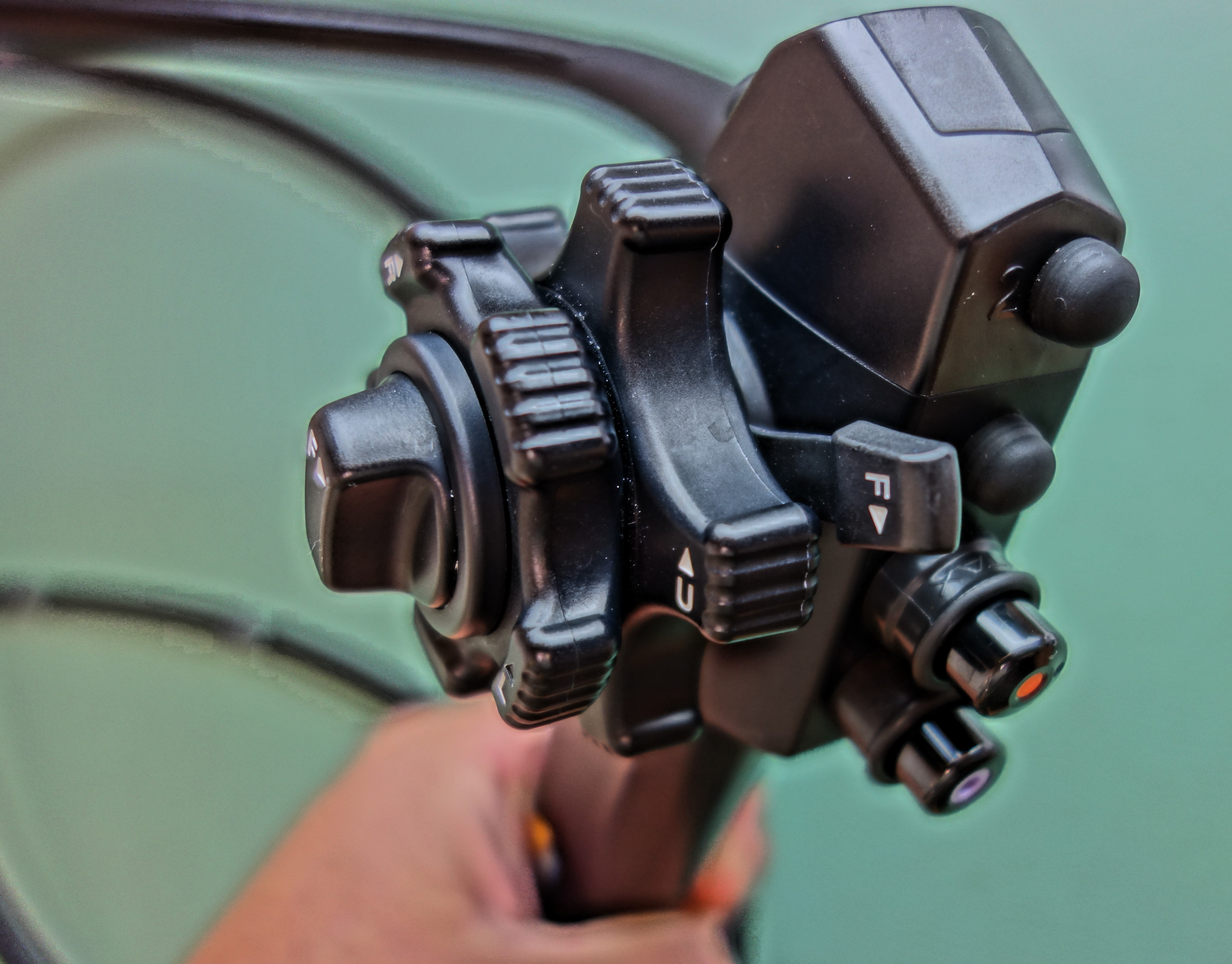 大腸内視鏡カメラ。ペンタックス製。操作部。同心円のダイヤル、左から左右アングルロック、左右アングル、上下アングル、上下アングルロック。ボタン上側から任意割り当て1、任意割り当て2、吸引ボタン、送気/送水ボタン。この他に背面に、任意割り当て3、フリーズボタン、シャッターボタンがある。任意割り当ては、測光方式や画像強調モード切替などに使用する。